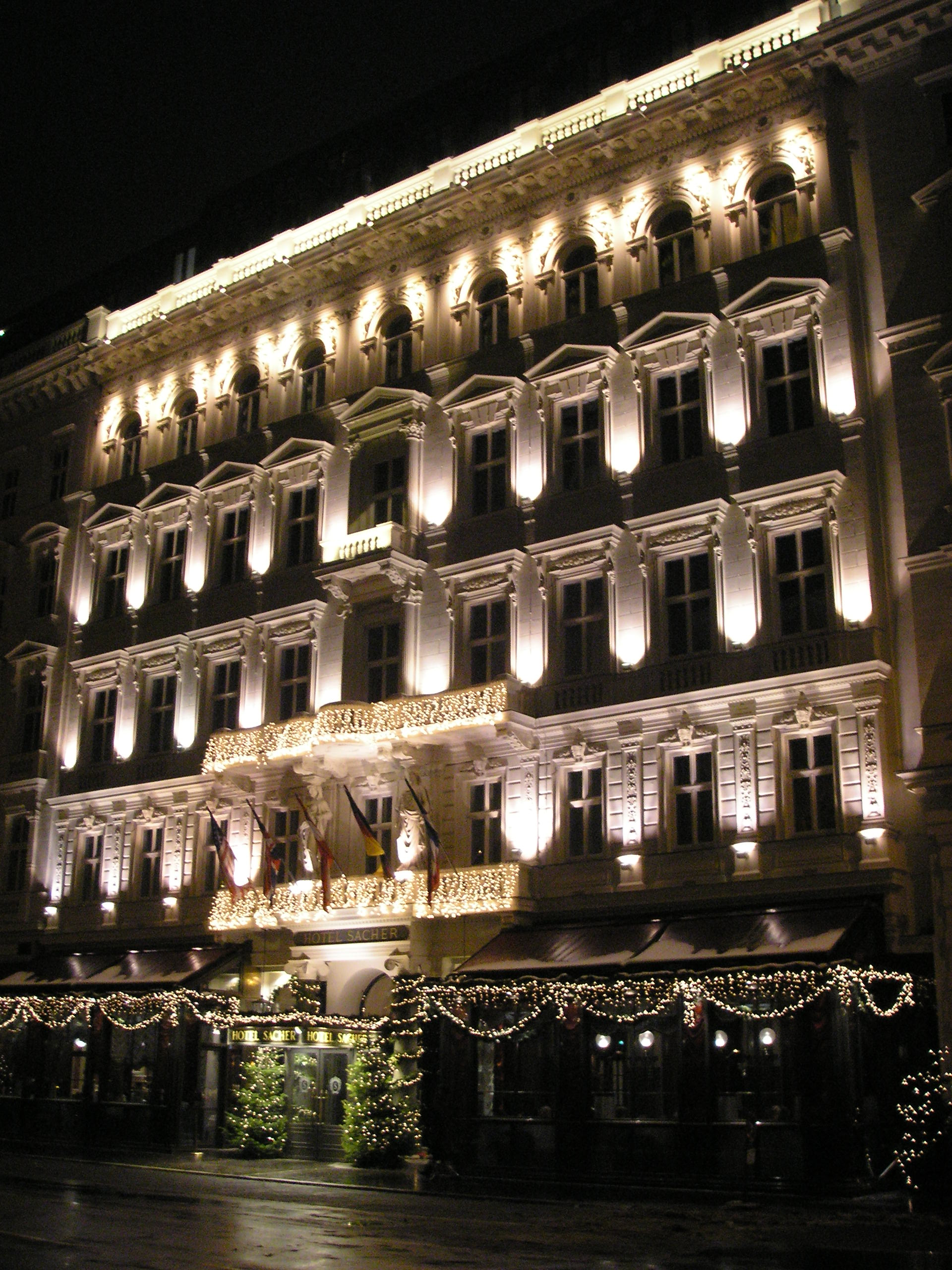 Description: Hotel Sacher in Vienna. Das Hotel Sacher in Wien, neben der Wiener Staatsoper. Source: self-made, I release it into the public domain.